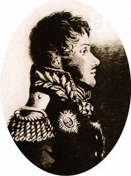 Портрет князя М.П.Долгорукова